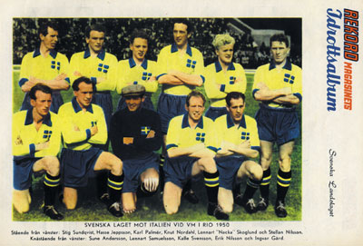 Sveriges lag vid VM i fotboll 1950.